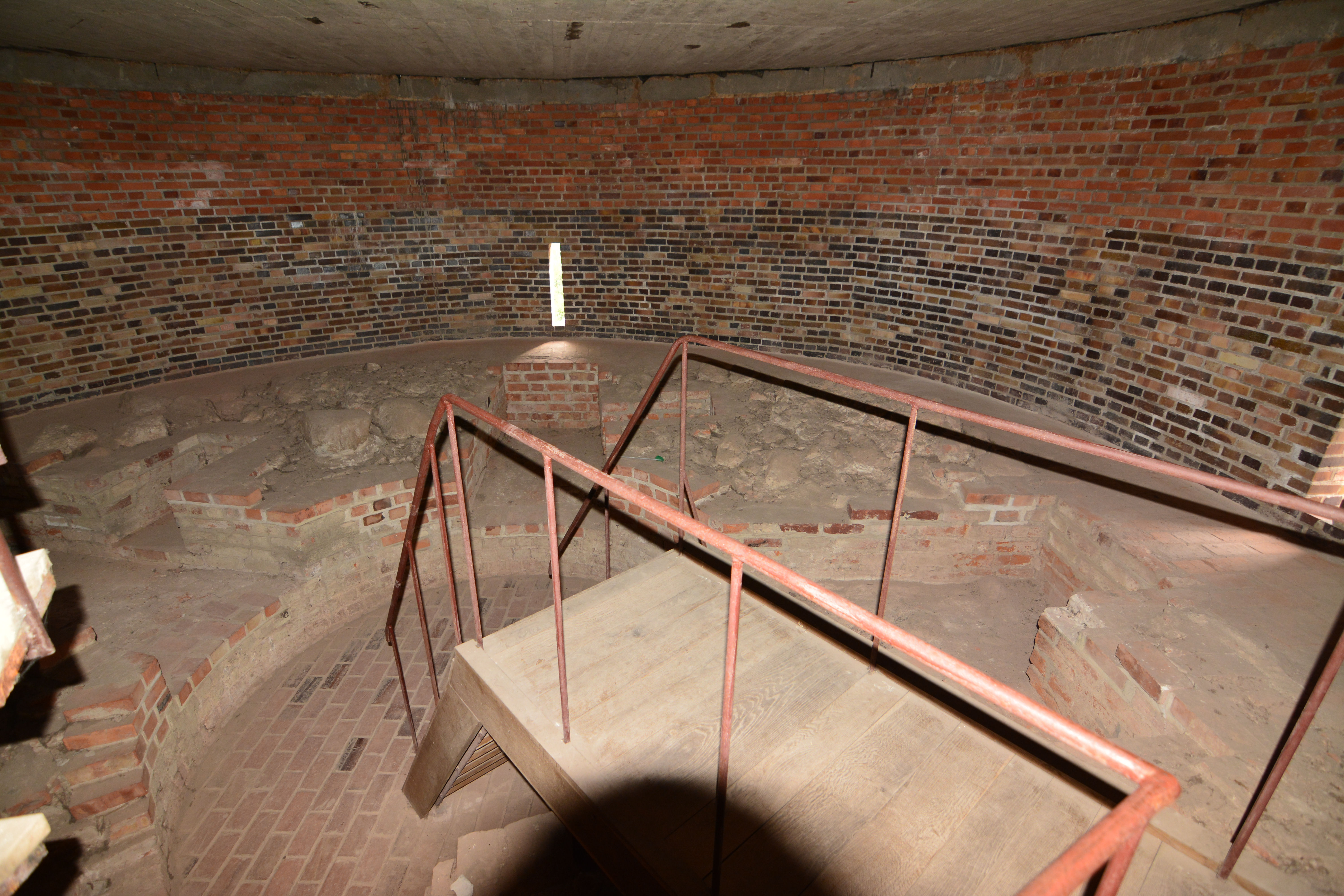 Pęzino - zamek, XIV, 1 poł. XVI, 1600, XIX